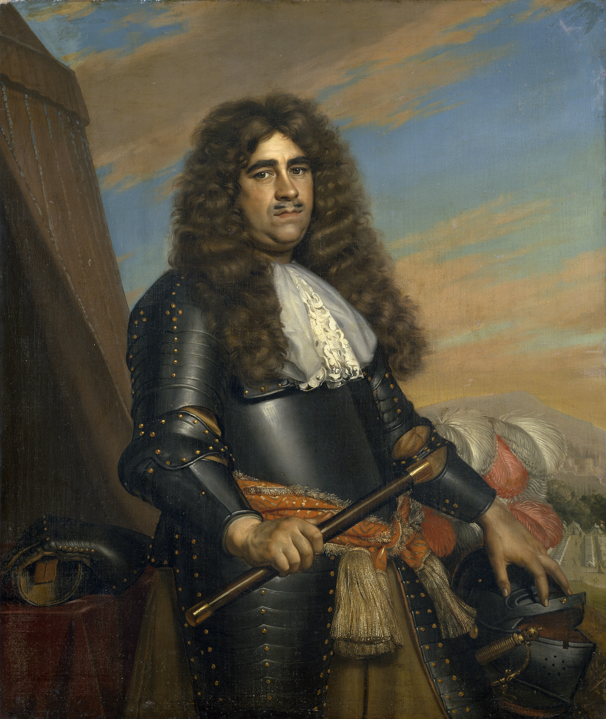 Un general